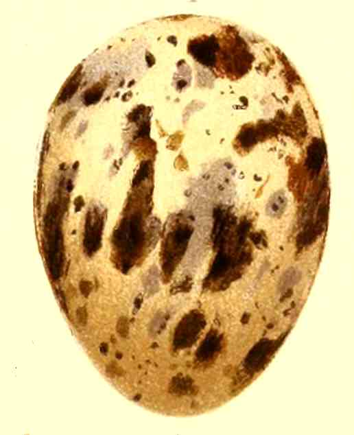 Indian Skimmer egg